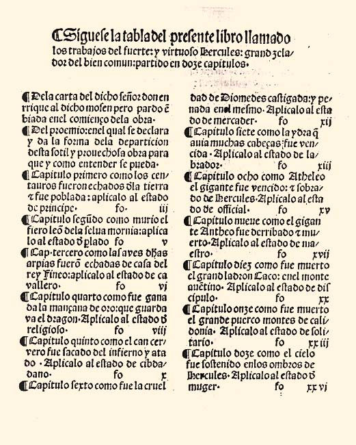 Los doze trabajos de Hércules